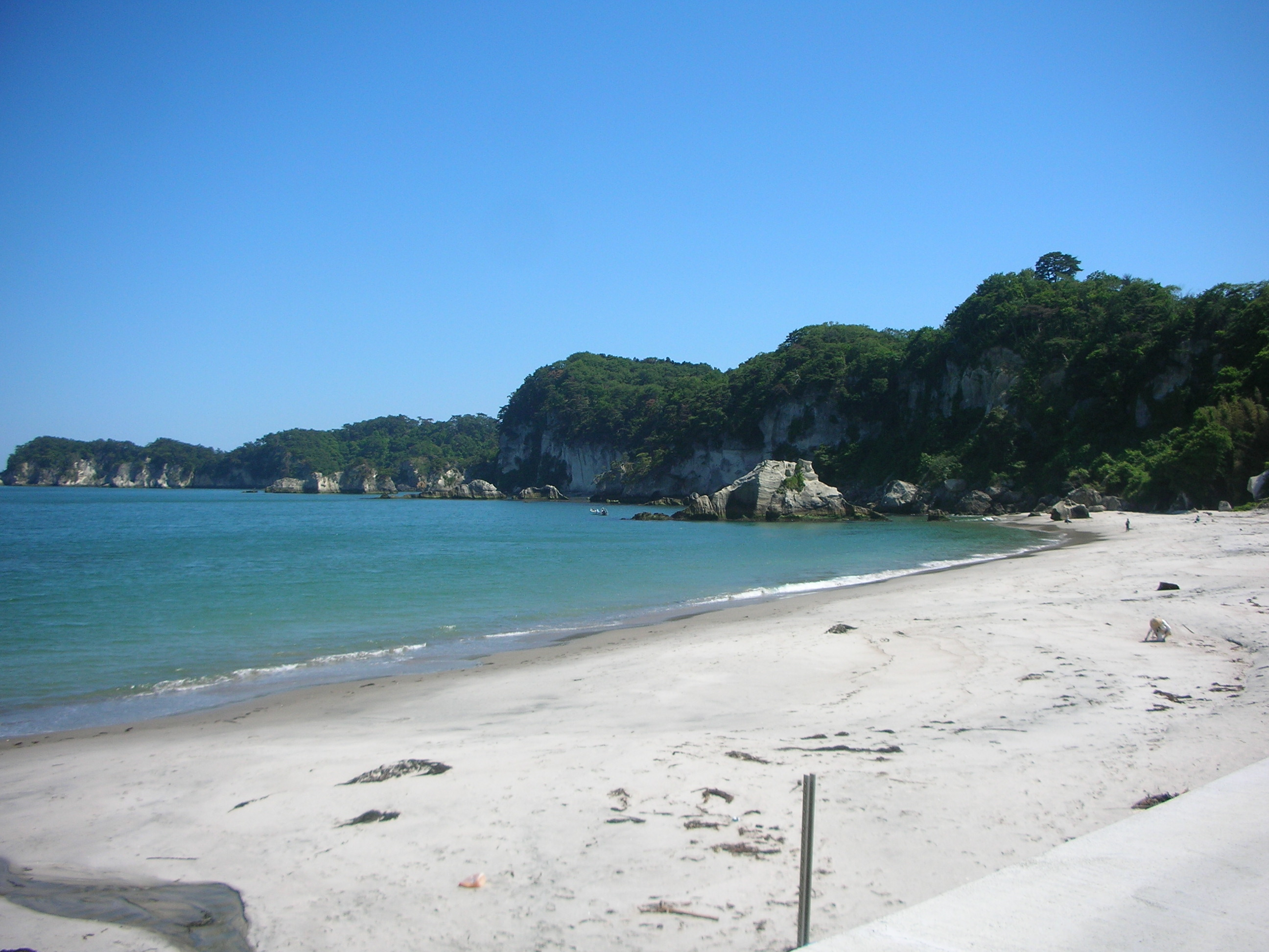 室浜から観た嵯峨渓